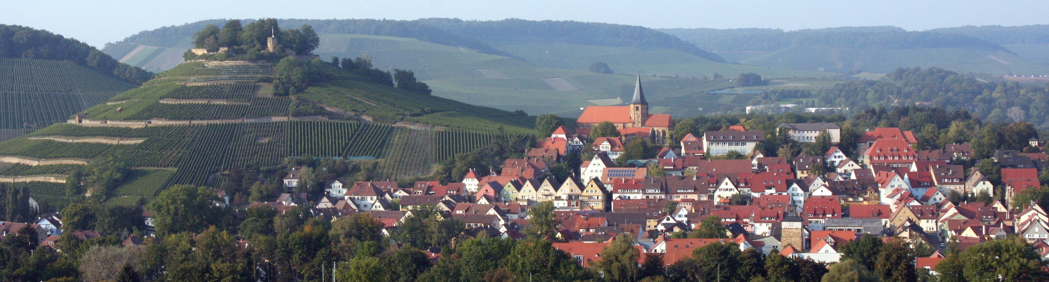 Weinsberger Kernstadt von Süden von erhöhtem Standpunkt